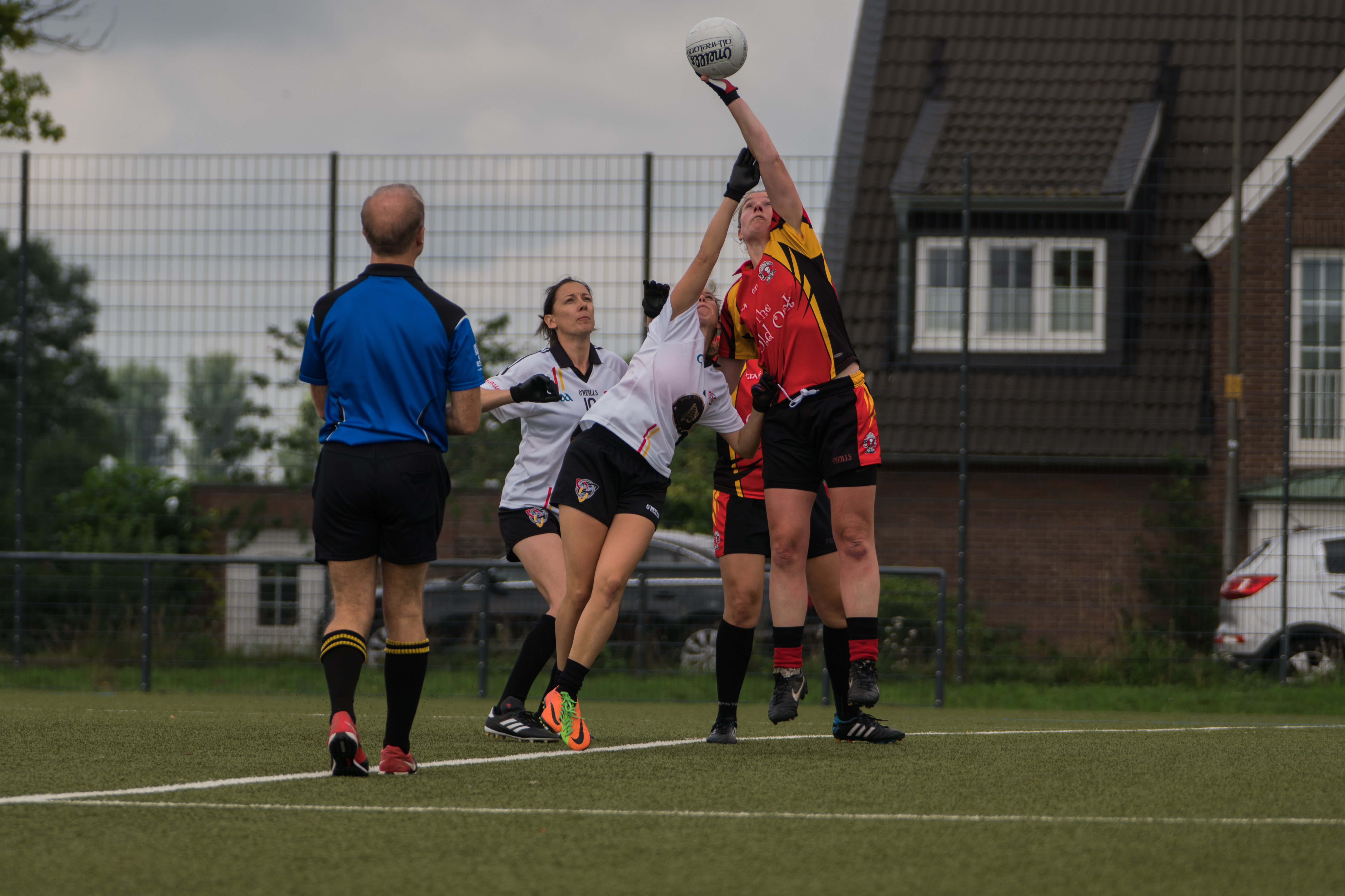 Das deutsche Ladies Gaelic Footbal Team bei dem Einwurf im Spiel gegen die Belgische Mannschaft